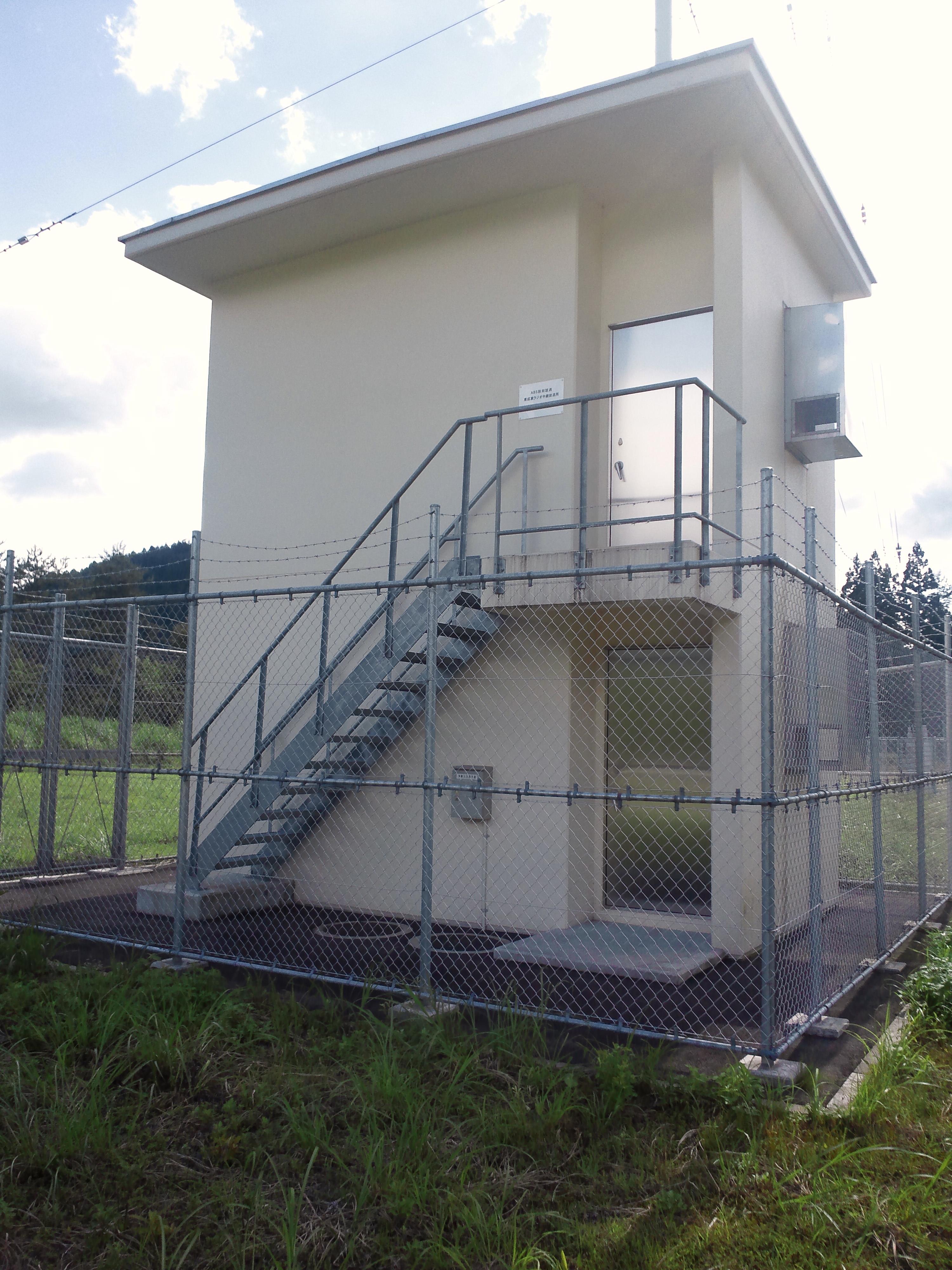 ABS東成瀬ラジオ中継所2